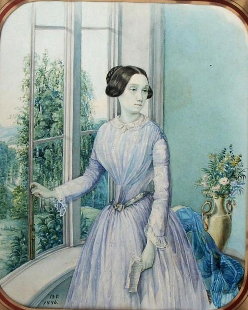 Варвара Семеновна Озерова (1821—1892), не замужем, унаследовала от сестры Евдокии село Аносино.